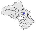 Mapa de la situació d'Èguet a l'Alta Cerdanya extret d'un altre mapa de lliure disposició.